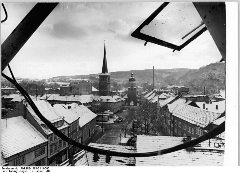 ADN-ZB Ludwig 19.1.84 Bez. Erfurt: Modernisierung Gute Fortschritte und viele Erfahrungen wurden in den letzten Jahren bei der komplexen Modernisierung ganzer Straßenzüge im Herzen von Arnstadt, vor 1280 Jahren zum ersten Mal urkundlich erwähnt und so der älteste Ort der Republik, gemacht. Die dabei entwickelte Partnerschaft zwischen Bauschaffenden, Volksvertretern und Bevölkerung wird auch für die für 1984 geplanten Maßnahmen von großem Nutzen sein. So entstehen im innerstädtischen Wohnungsbau 78 Wohnungen unweit des historischen Marktplatzes und 597 Wohnungen der 30 000 Einwohner zählenden Kreisstadt werden modernisiert. (Blick vom Montagekran über die Altstadt auf den Riedplatz mit dem Jacobsturm und dem Riedtor, einem Teil der alten Stadtbefestigung. siehe auch 1984-0119-1N